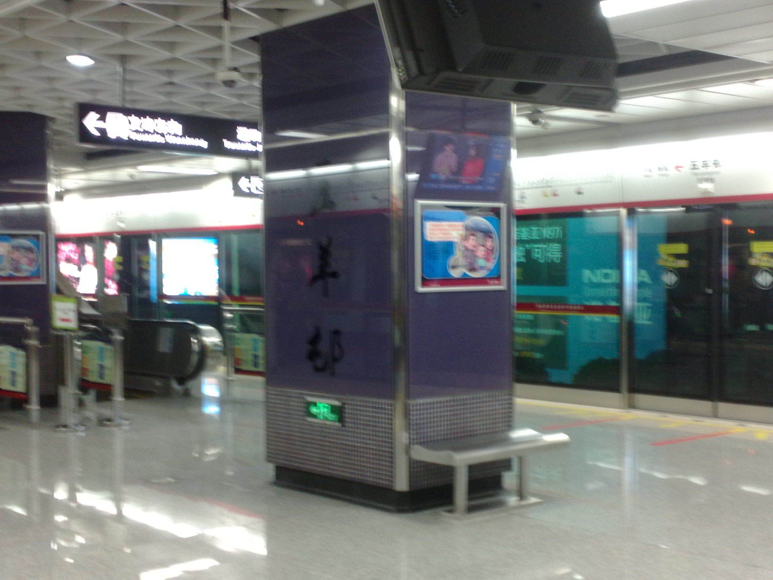 廣州地鐵五羊邨站站台